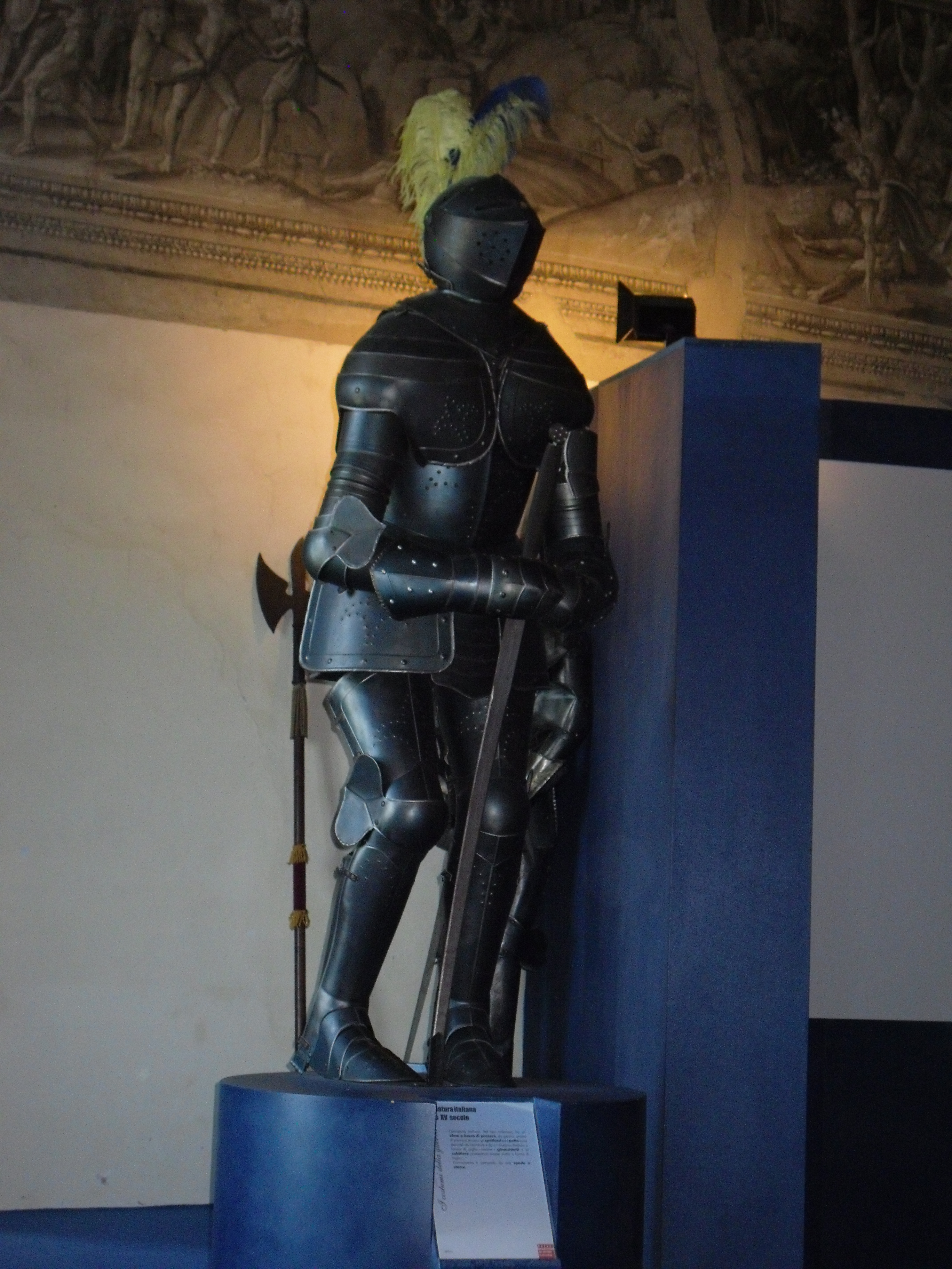 armatura della terza sala del Museo del costume farnesiano, a Gradoli, in Italy.